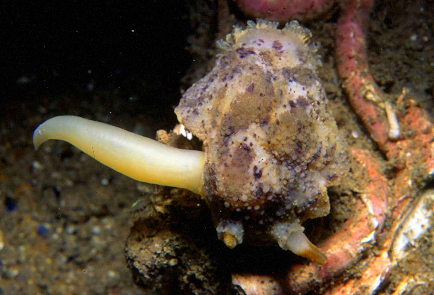 Doris pseudoargus Rapp, 1827 - Banyuls-sur-Mer, le Troc : 07/91